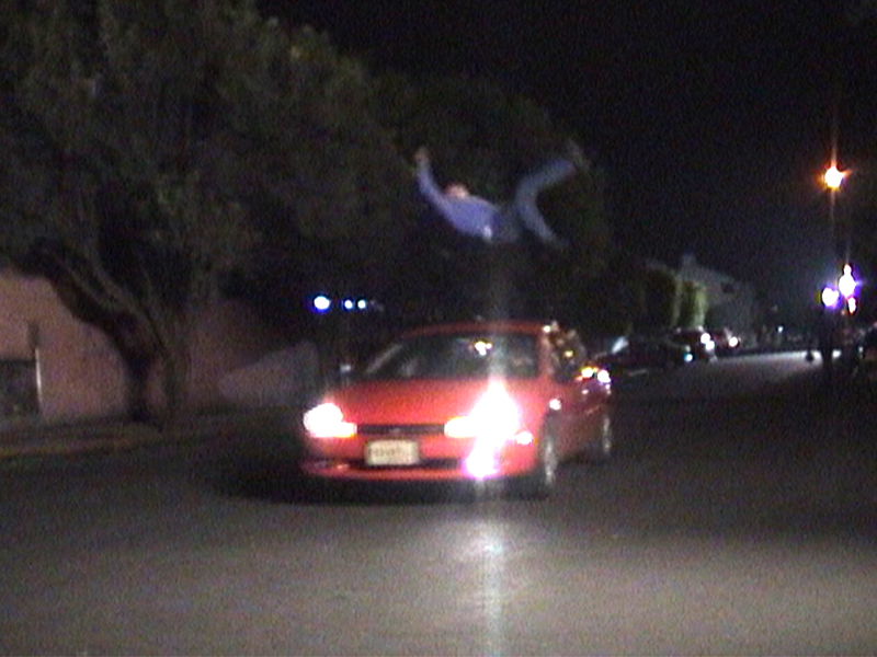 Dobles de cine Ejemplo Atropellamiento